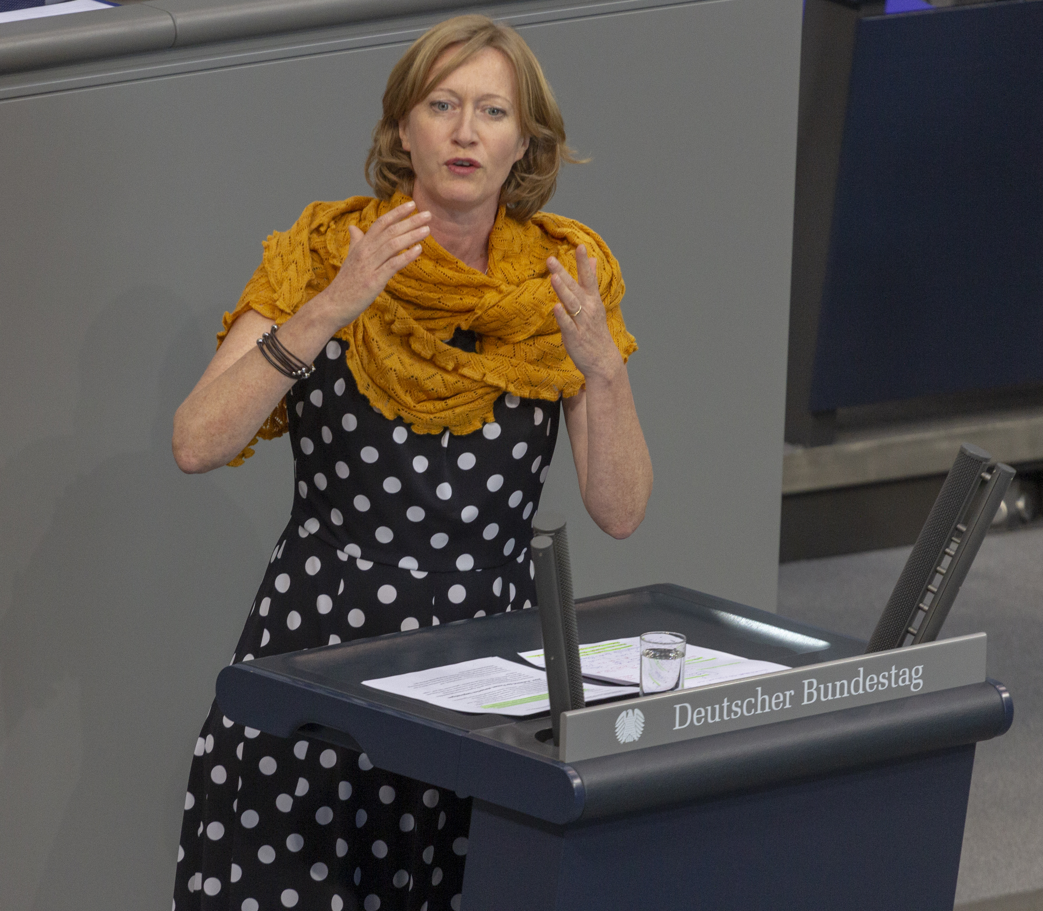 Kerstin Andreae während der Plenarsitzung des Deutschen Bundestages am 27. Juni 2019 in Berlin.